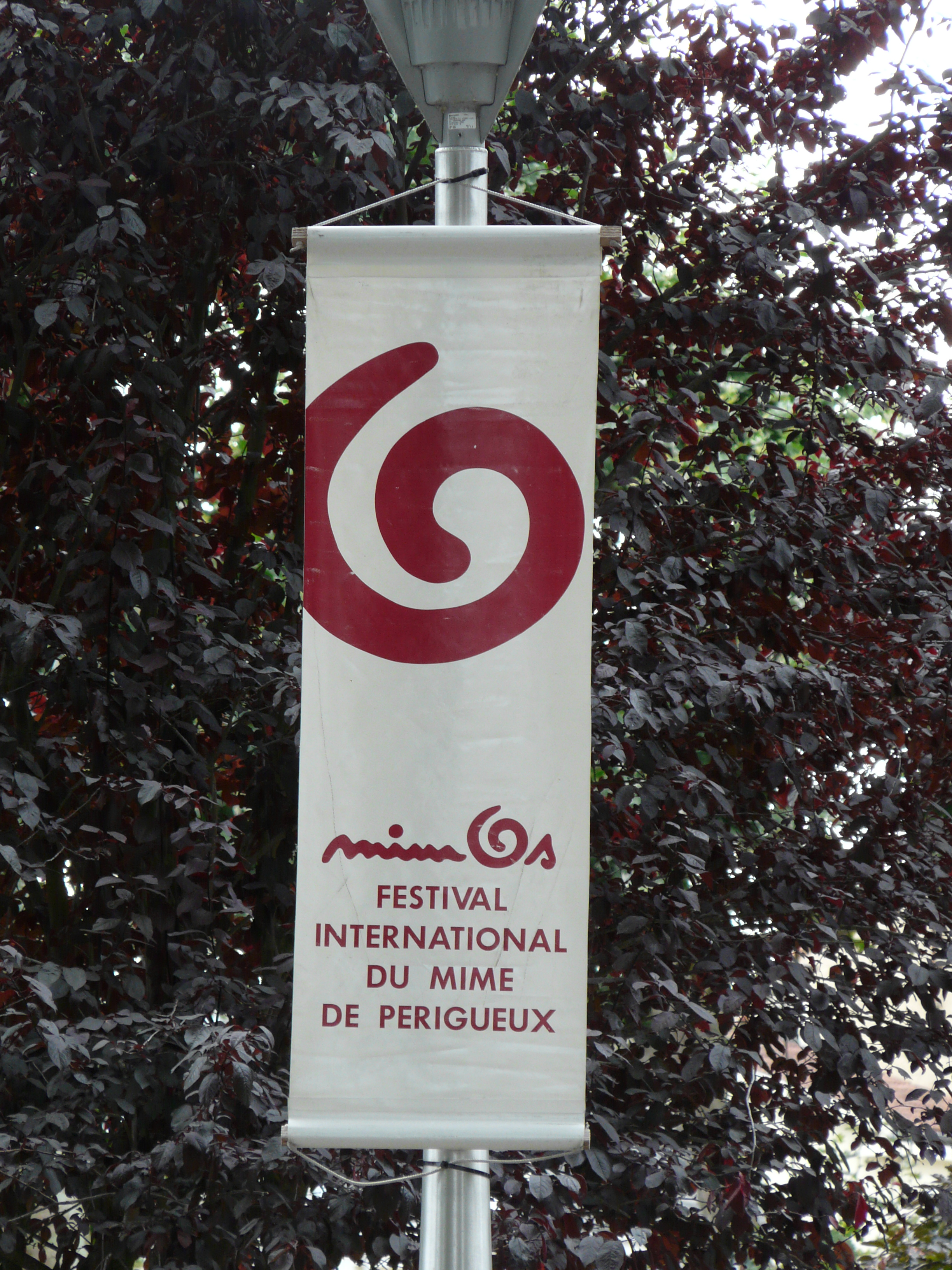 Bannière du festival Mimos à Périgueux, Dordogne, France.